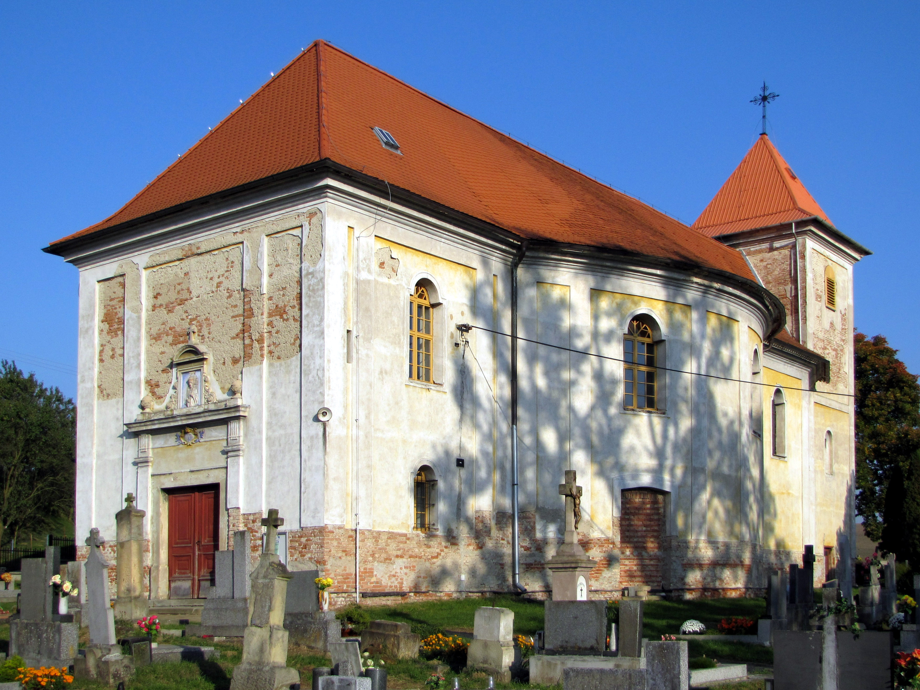 Kostel sv. Václava v Nemoticích, okres Vyškov